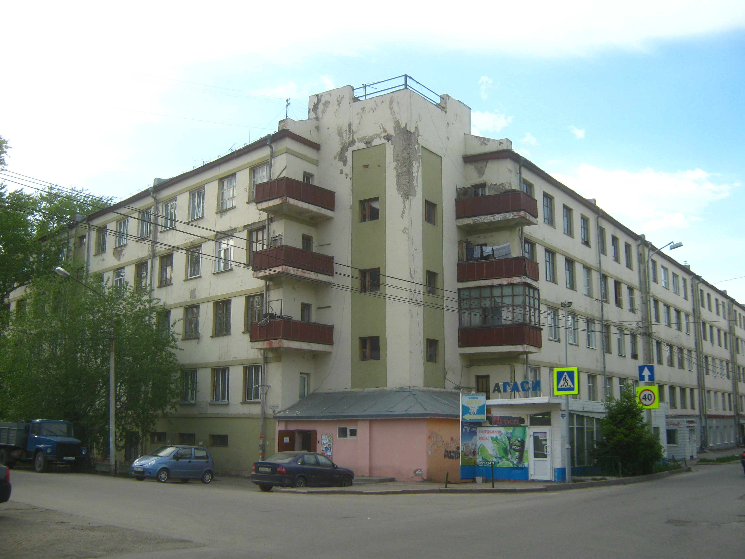 Никитина 4 - Крылова 19, Томск